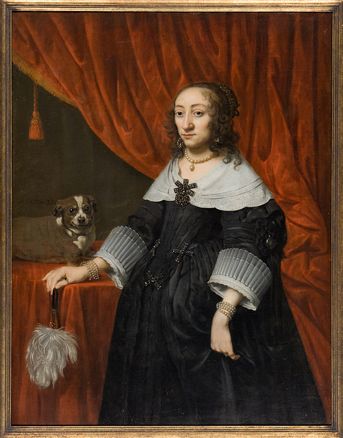 Katharina Charlotte (1615-1651), Herzogin von Zweibrücken, Pfalzgräfin bei Rhein zu Neuburg, Herzogin von Jülich-Berg